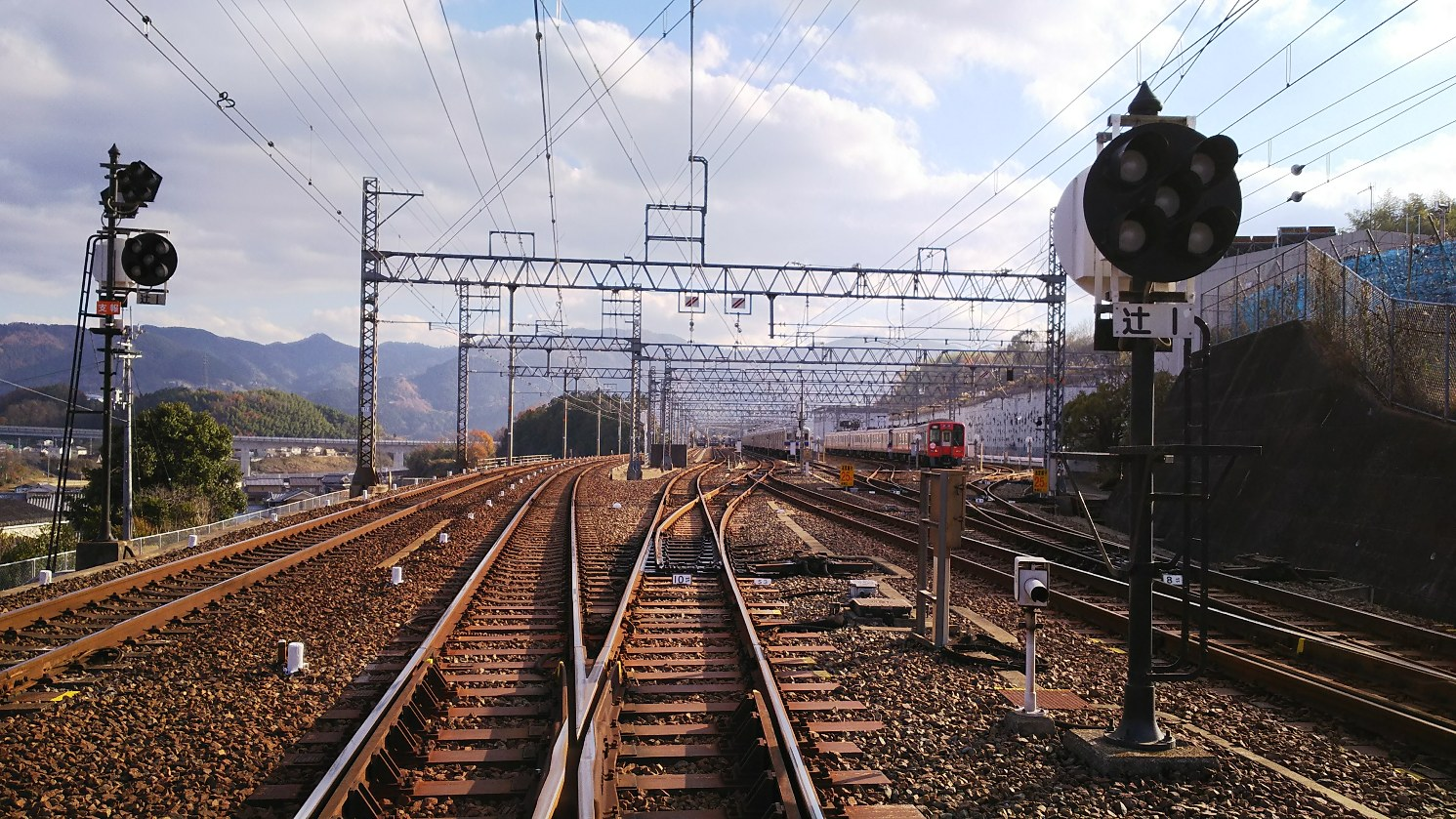 小原田信号所下り方